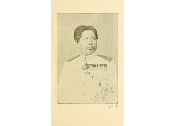 รูปพระยาอภิรักษ์